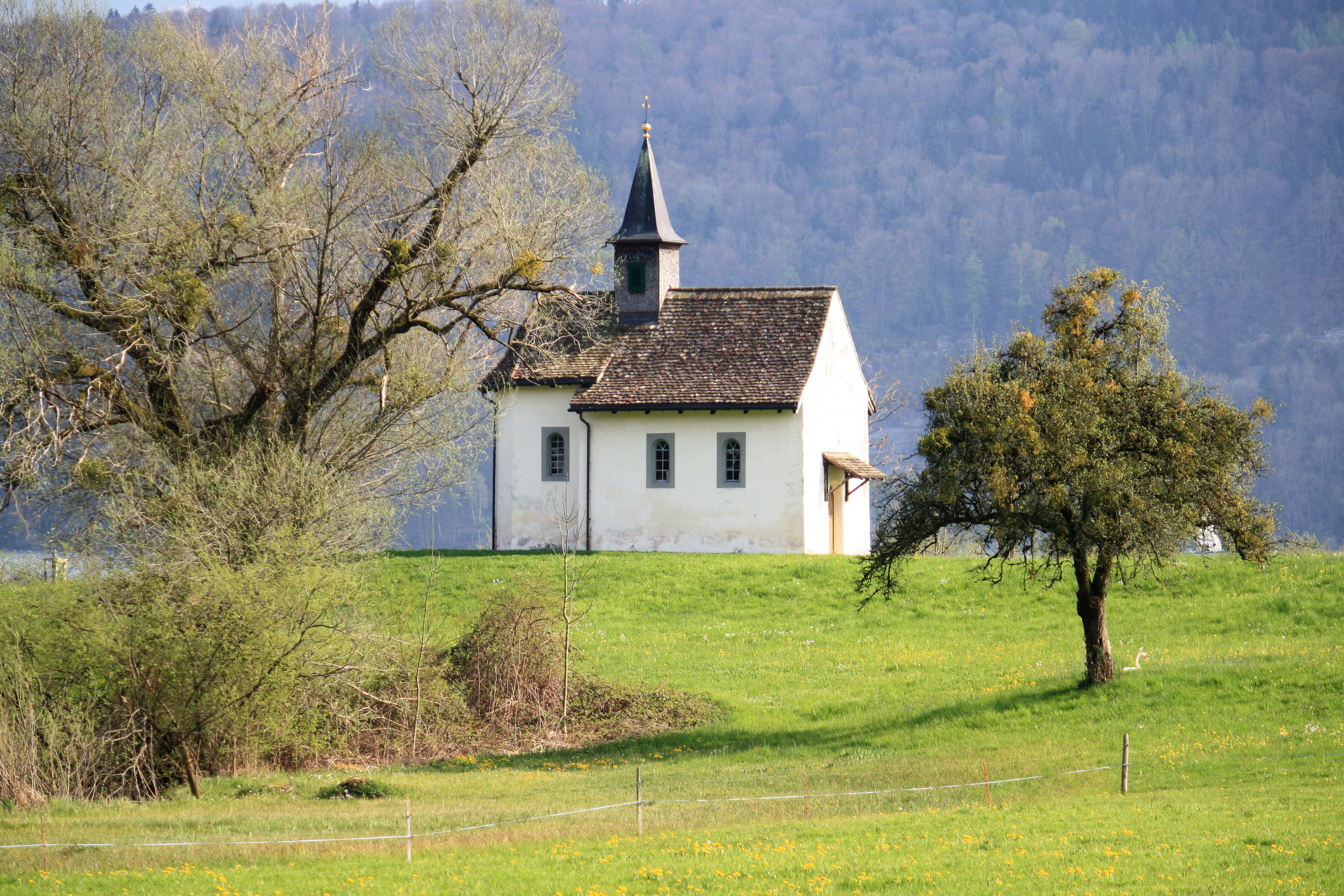 St. Meinrad Kapelle in Bollingen on Obersee (upper Lake Zürich) shore